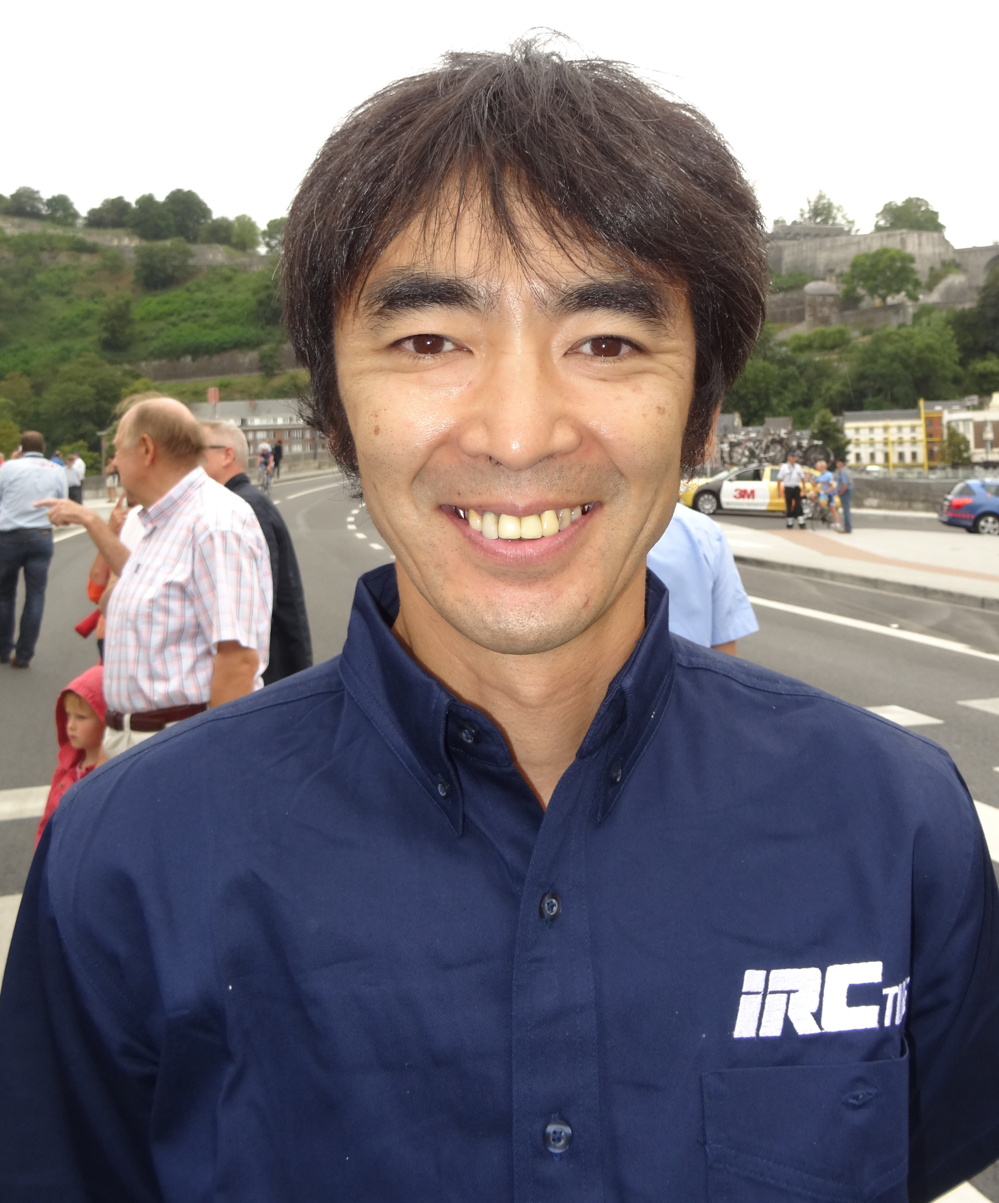 Reportage photographique réalisé le mercredi 6 août à l'occasion du départ de la première étape du Tour de la province de Namur 2014 à Jambes (Namur), Belgique.